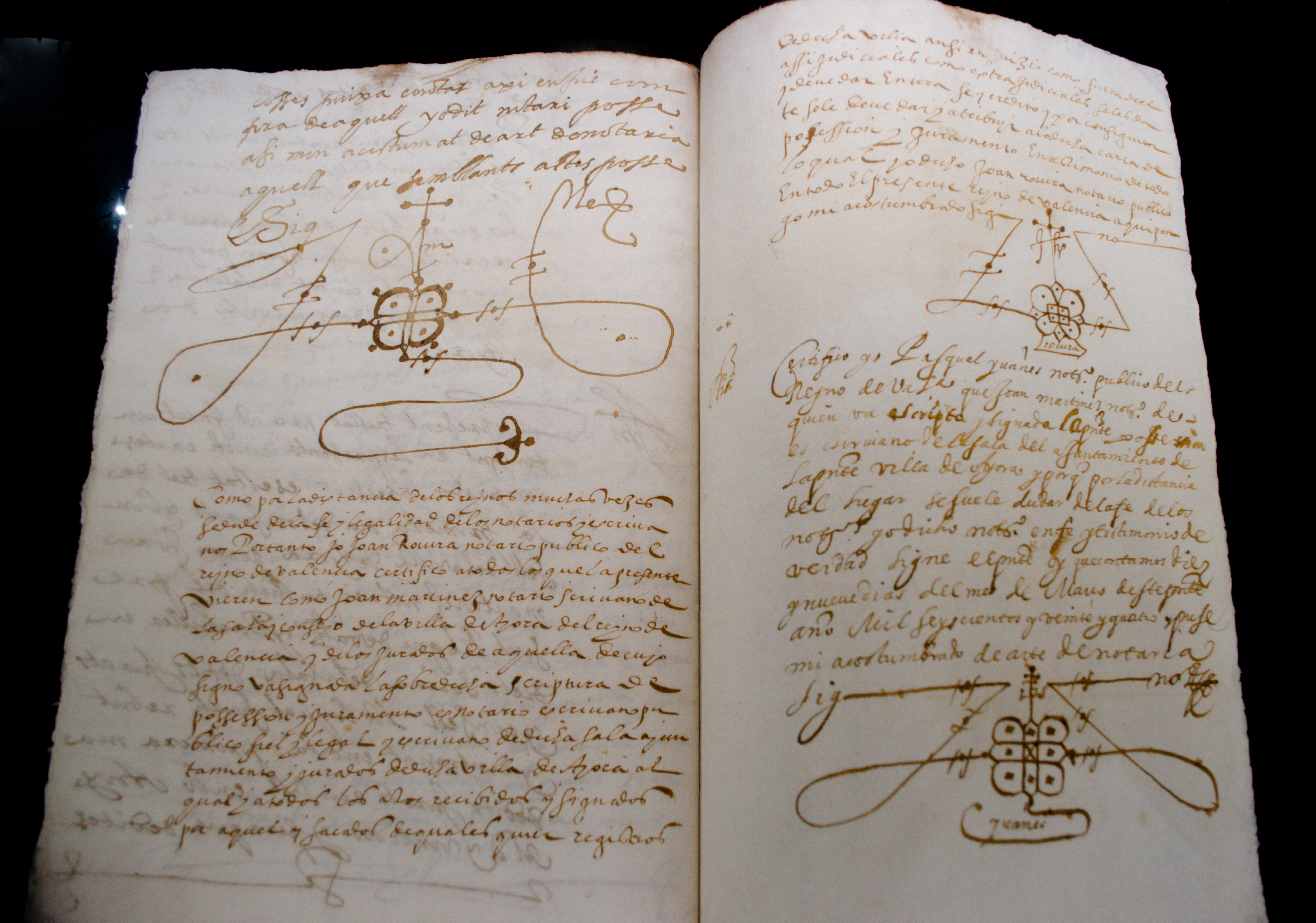 Acta de possessió i jurament de la vila d'Aiora a Mencía de Mendoza, marquesa de Cenete (7 de novembre de 1522).